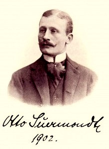 Porträt Otto Suermondt